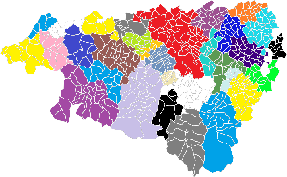 Les Pyrénées-Atlantiques comptent 29 intercommunalités à fiscalité propre.